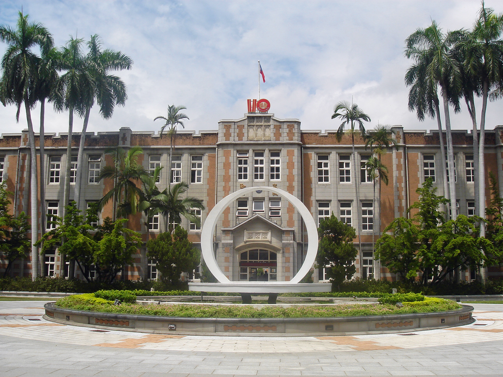 中文（台灣）: 國立臺中教育大學行政大樓。